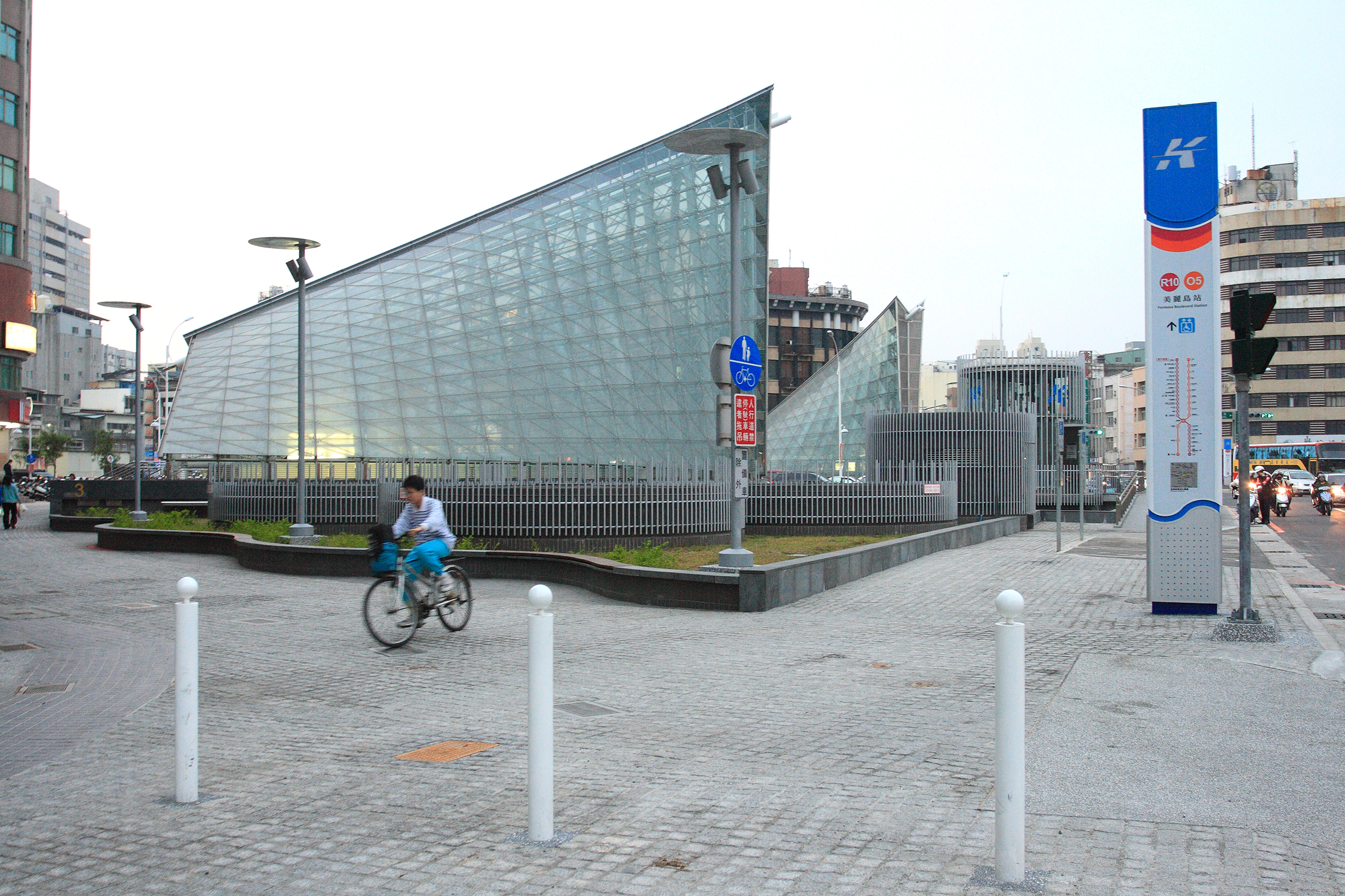 高雄捷運美麗島站